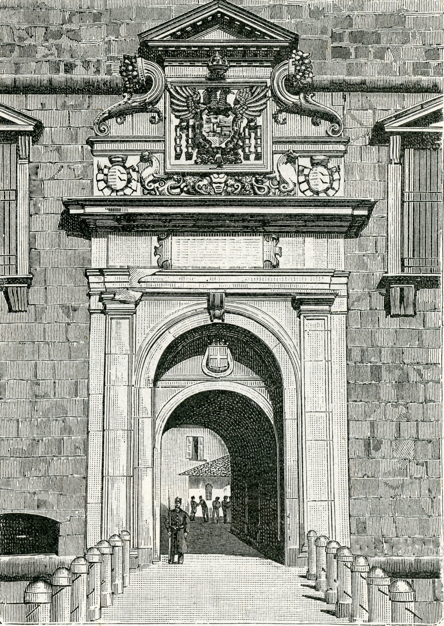 Aquila: porta del castello (incisore anonimo 1899).